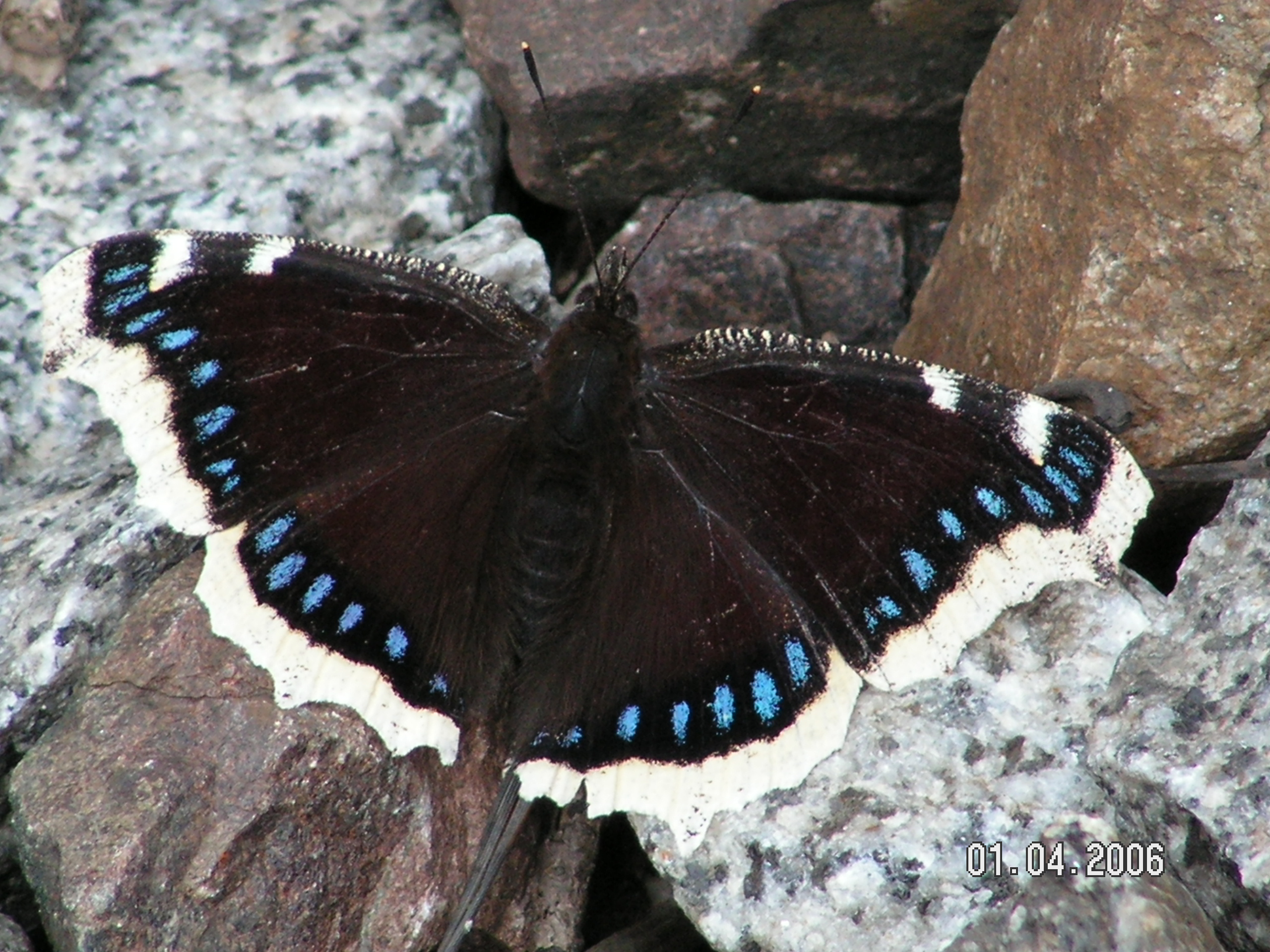 Babočka osiková (Nymphalis antiopa)